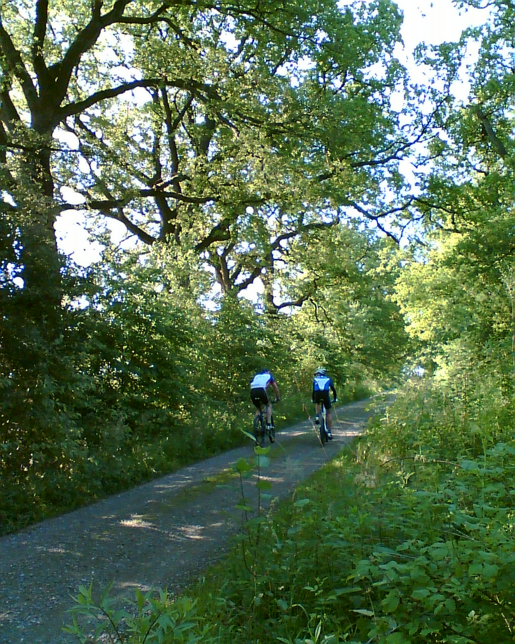 Mountainbiking auf der Eichenallee in Neuhaus im Solling